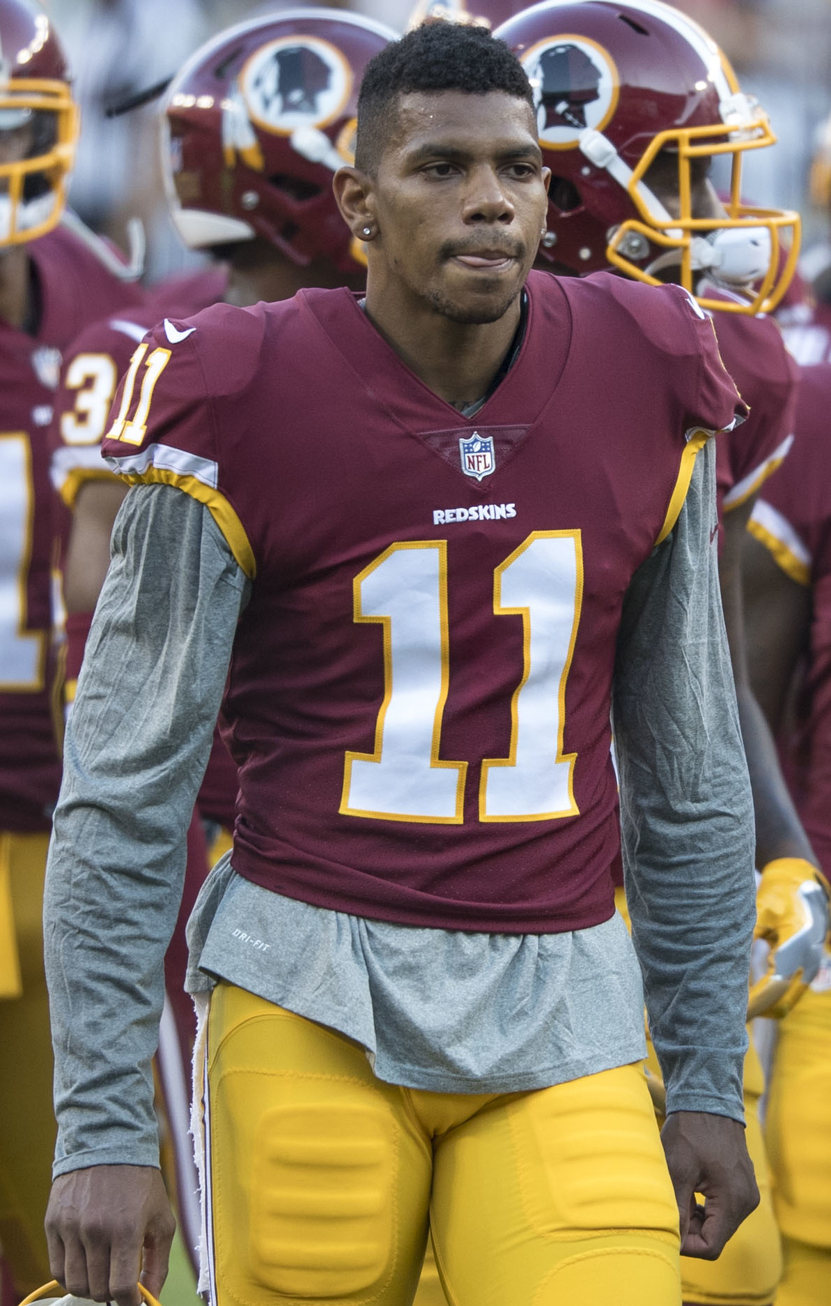 Packers at Redskins 8/19/17